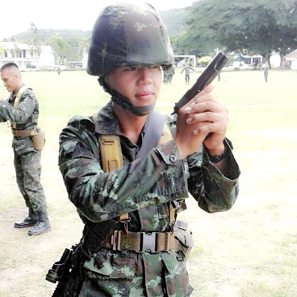 Thai Army